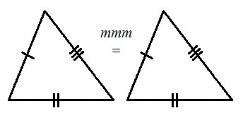 Trijstūru vienādības pazīme mmm